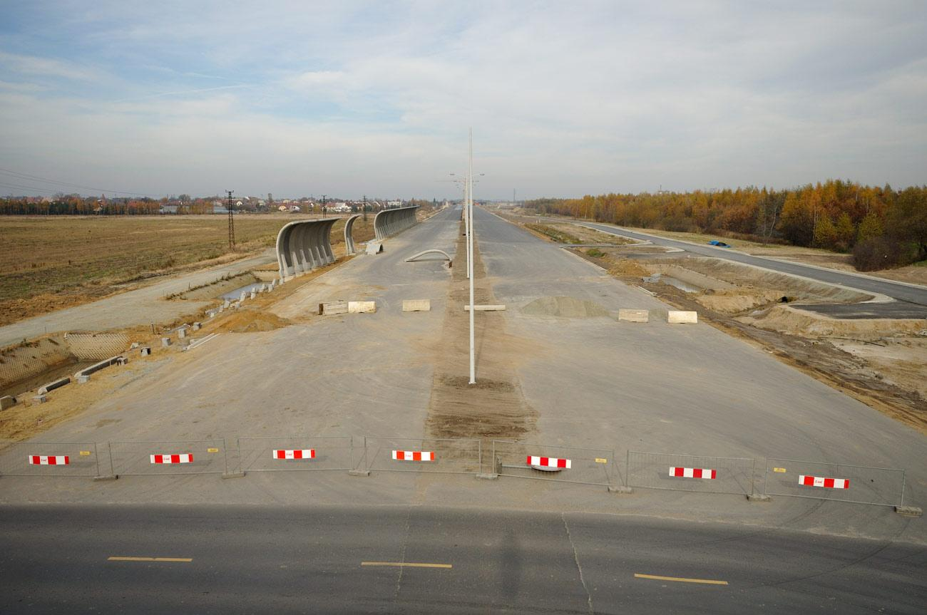 AOW - odcinek Lotnisko - Kosmonautów widziana z nowego wiaduktu w ciągu ulicy Granicznej. W dole widać tymczasową jezdnię ulicy Granicznej, która krzyżuje się na jednym poziomie z budowaną autostradą.